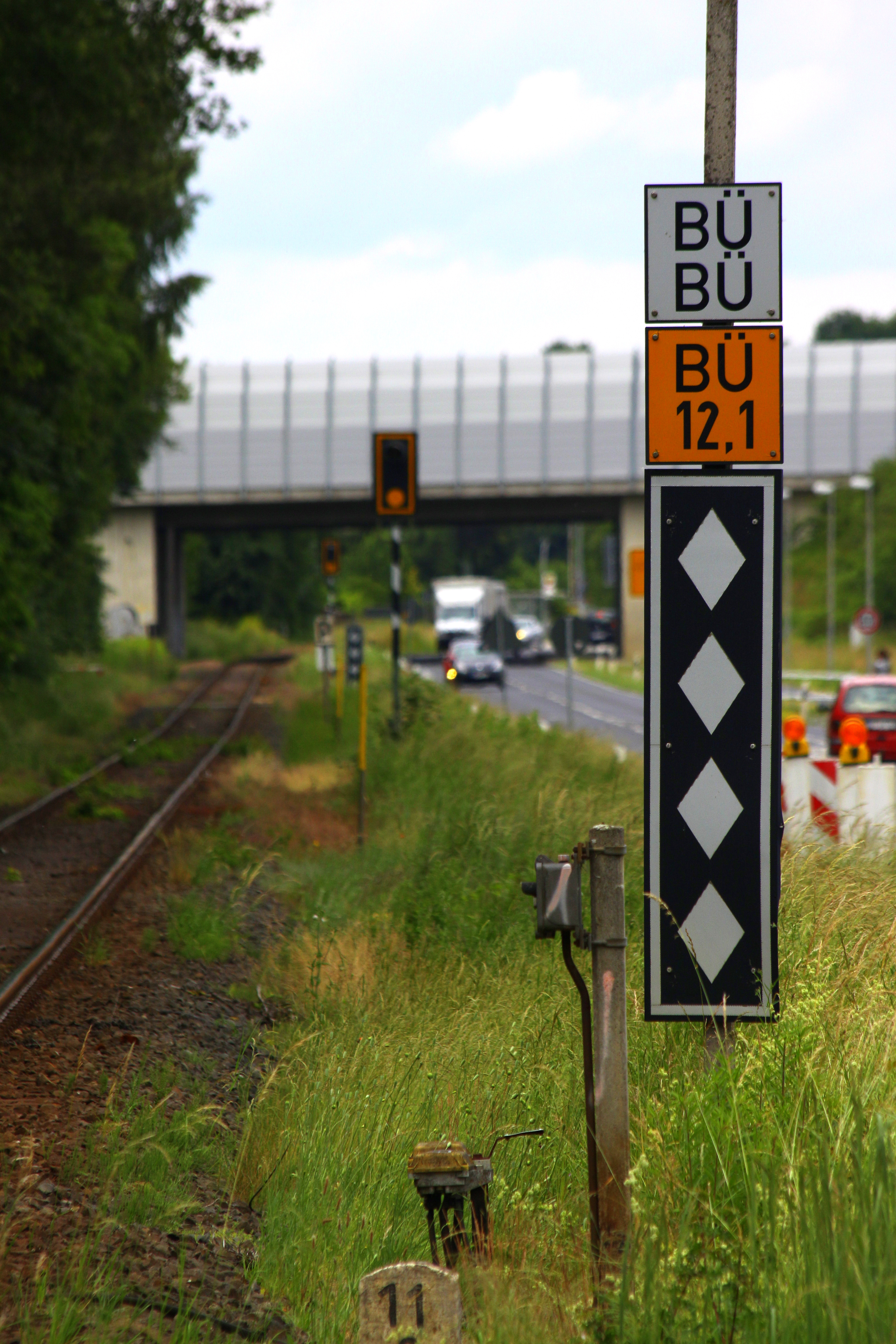 BÜBÜ Tafel über einer Rautentafel zur Ankündigung mehrerer Bahnübergänge hintereinander nach einem gemeinsamen Überwachungssignal. Aufgestellt vor den Bahnübergängen in Braunschweig Bienrode.